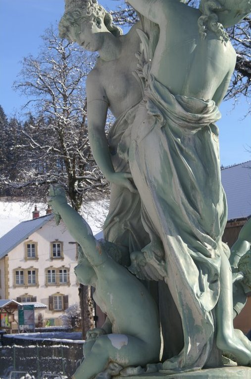 détail de la fontaine des Gras (Doubs)